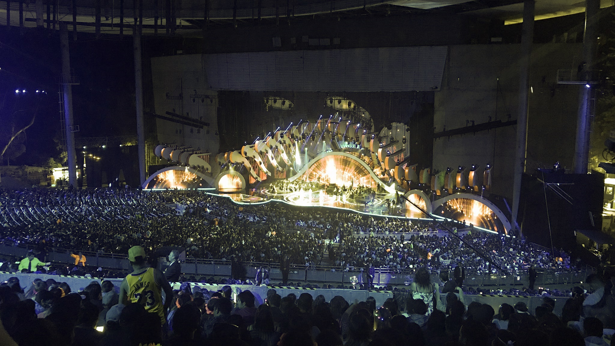 Escenario ubicado en la Quinta Vergara donde se desarrolló el Festival de Viña del Mar entre el 24 de febrero hasta el 1 de marzo de 2019.